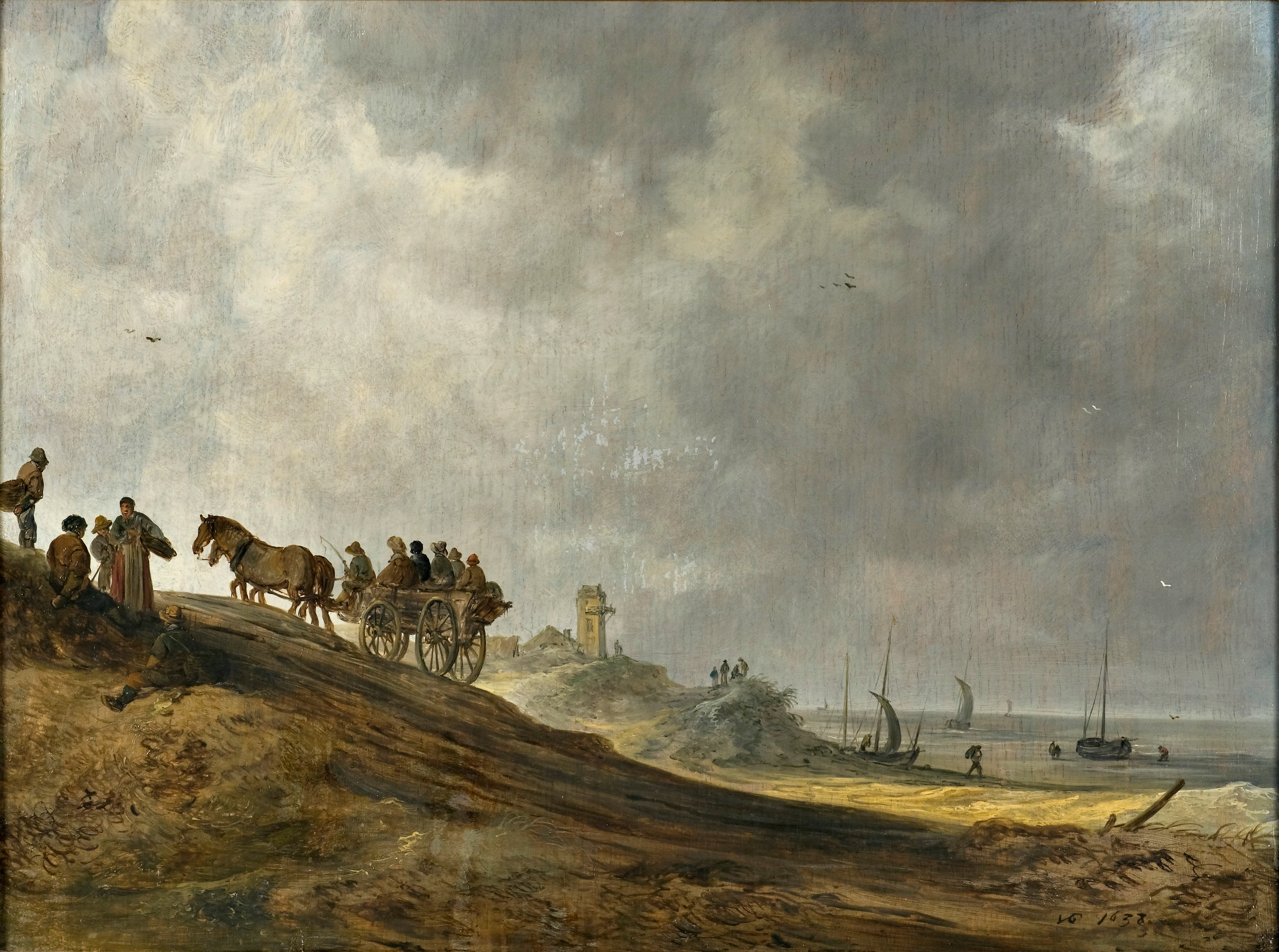 Beach scenelabel QS:Len,"Beach scene" label QS:Lda,"Strandbillede"